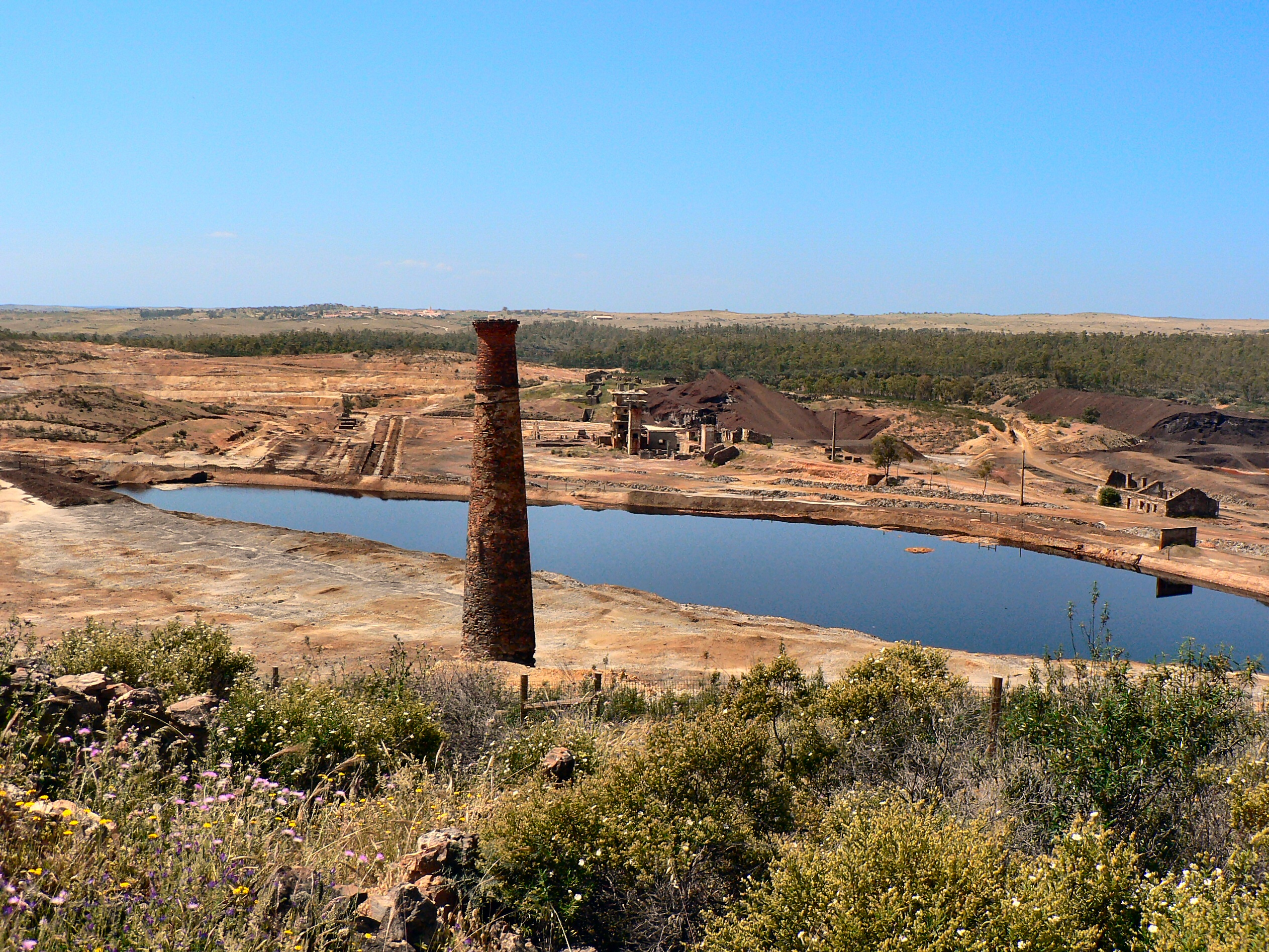 Antigo forno comunitário usado pelos trabalhadores das minas